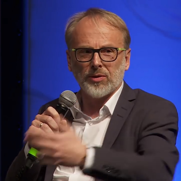 Nach einem Volontariat bei der „Heidenheimer Zeitung“ arbeitete Schröm unter anderem für „Die Zeit“, die „Frankfurter Allgemeine Sonntagszeitung“ sowie für das ZDF-Magazin „Kennzeichen D“.